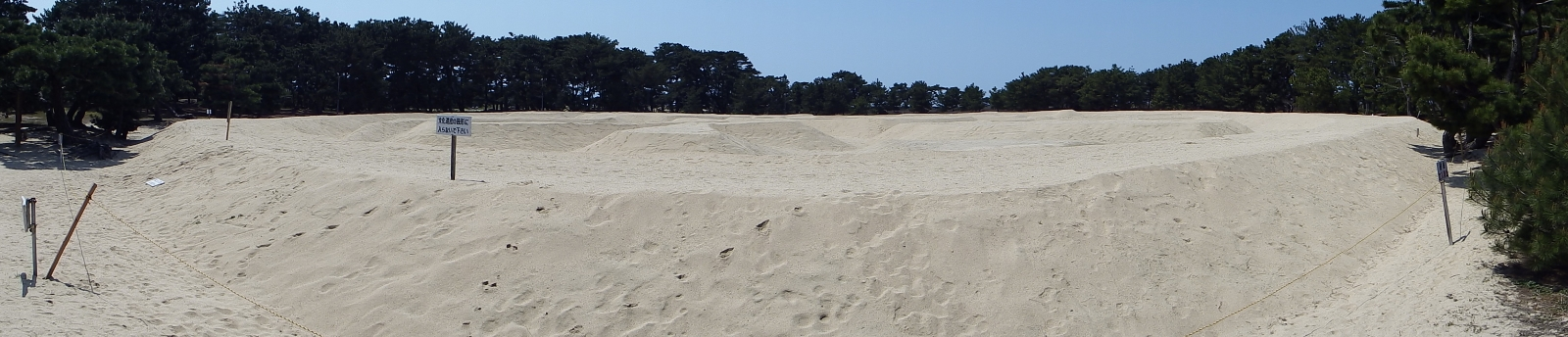 銭形砂絵を地上から